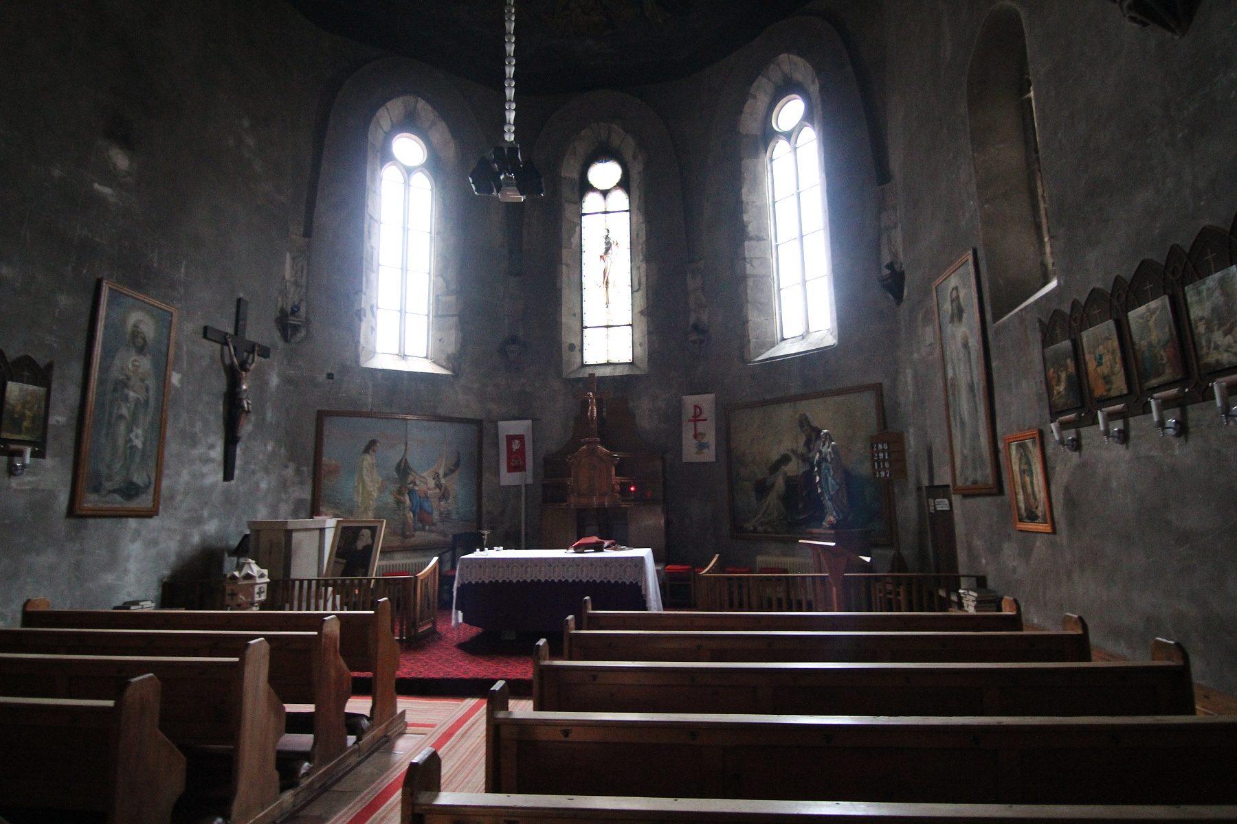 Biserica catolică "Sf. Iacob cel Mare" (corul primei biserici gotice) 01